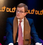 Hermann Ude